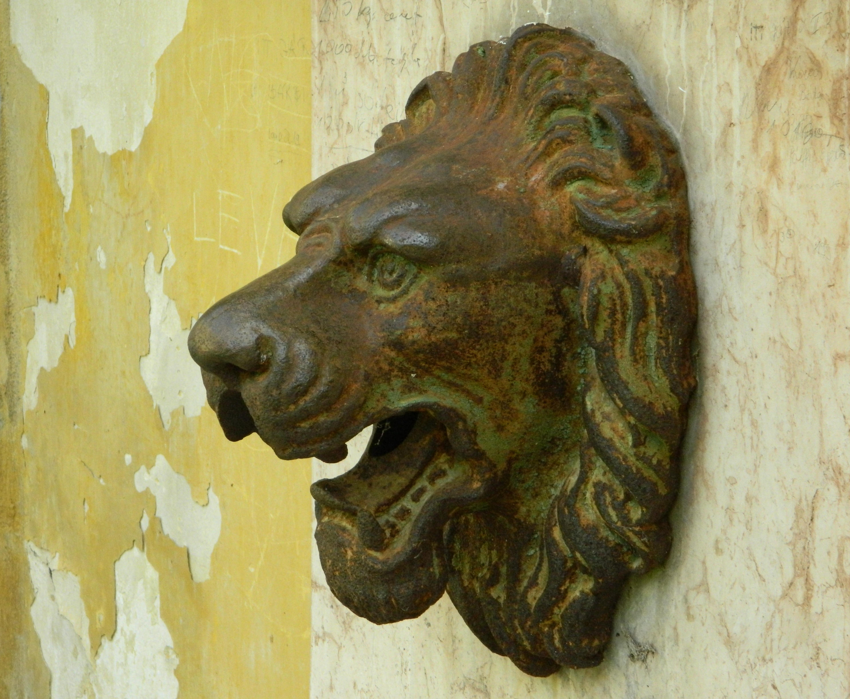 Károlyi-kastélyegyüttes és parkja, Füzérradvány – Falikút vízköpője a kastélyegyüttes falán This is a photo of a monument in Hungary. Identifier: 2768